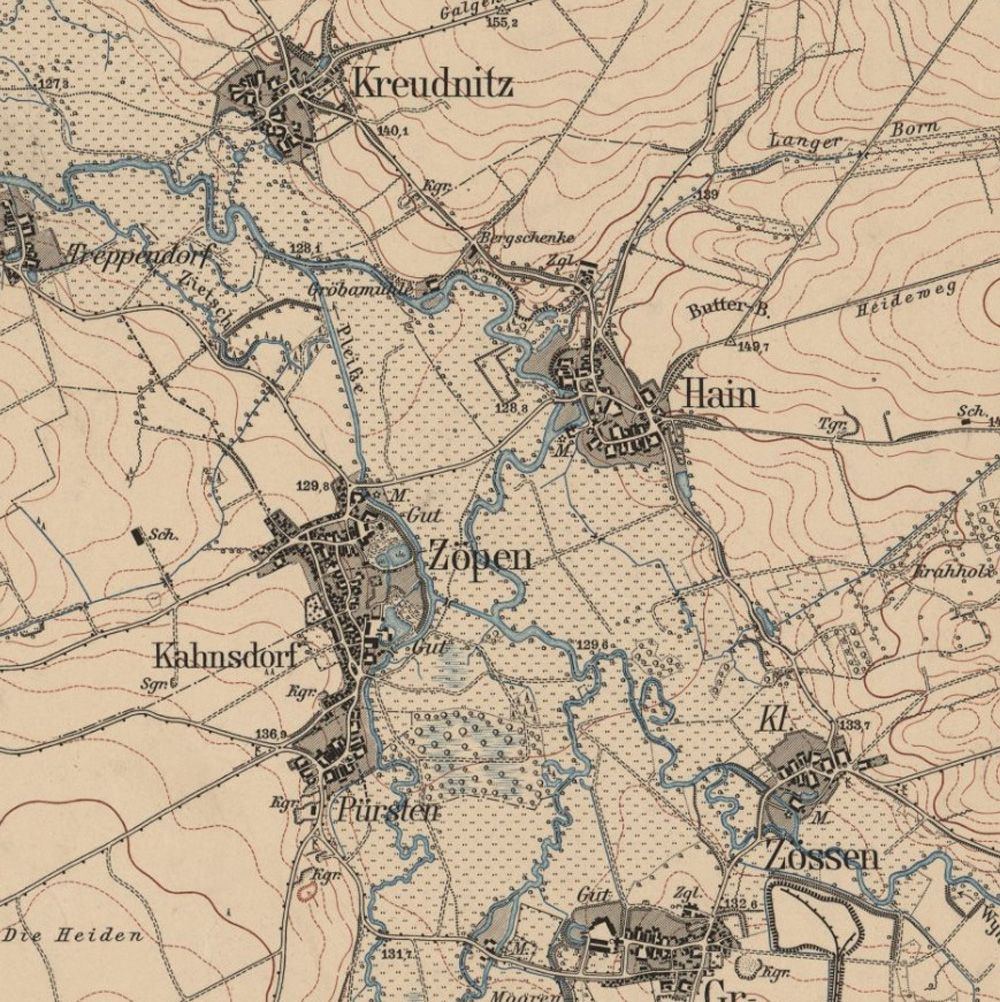 Hain auf eine Karte von 1908 (Ausschnitt)